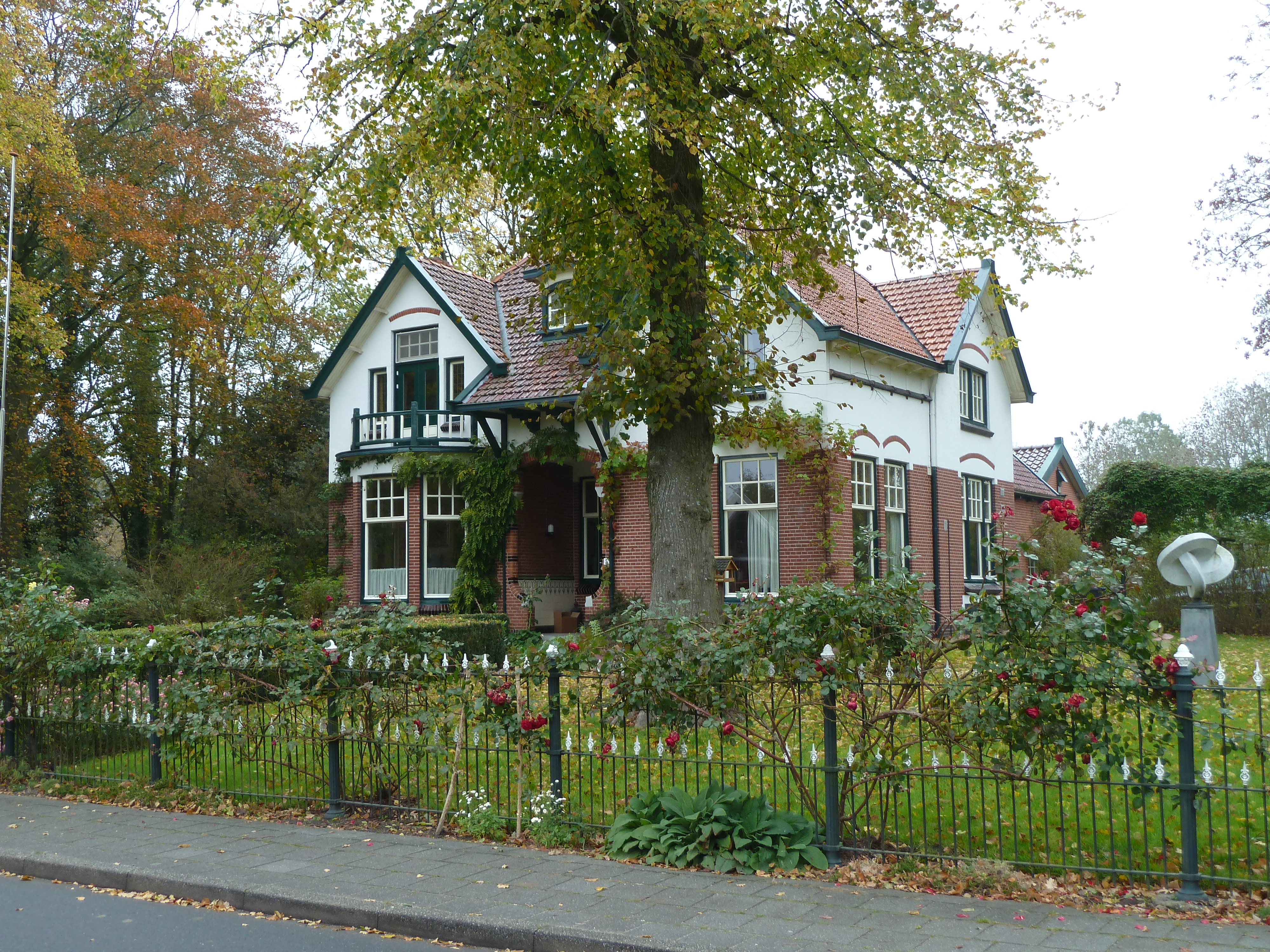 De oude pastorie van Niekerk. Gebouwd in 1915.